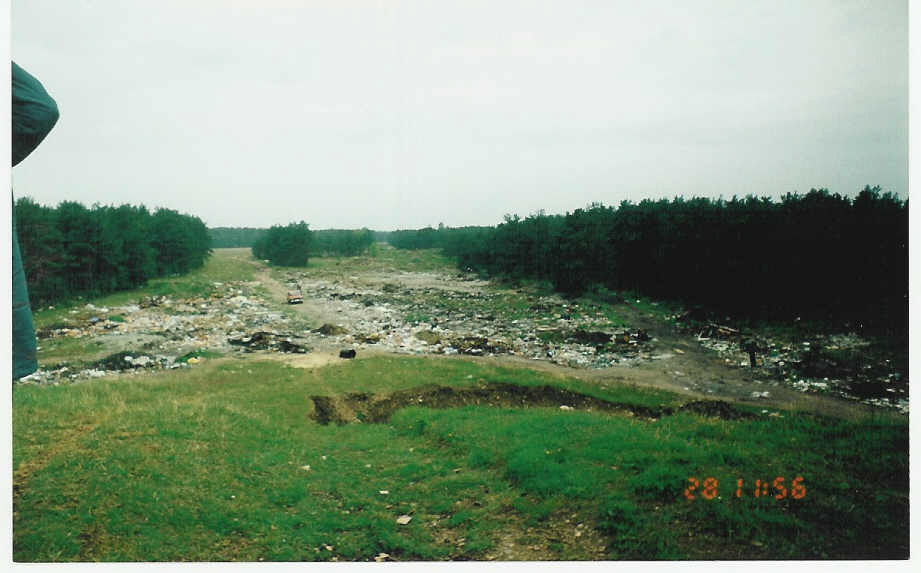 Tankimäele tekkinud prügimägi pärast NSV Liidu armee lahkumist